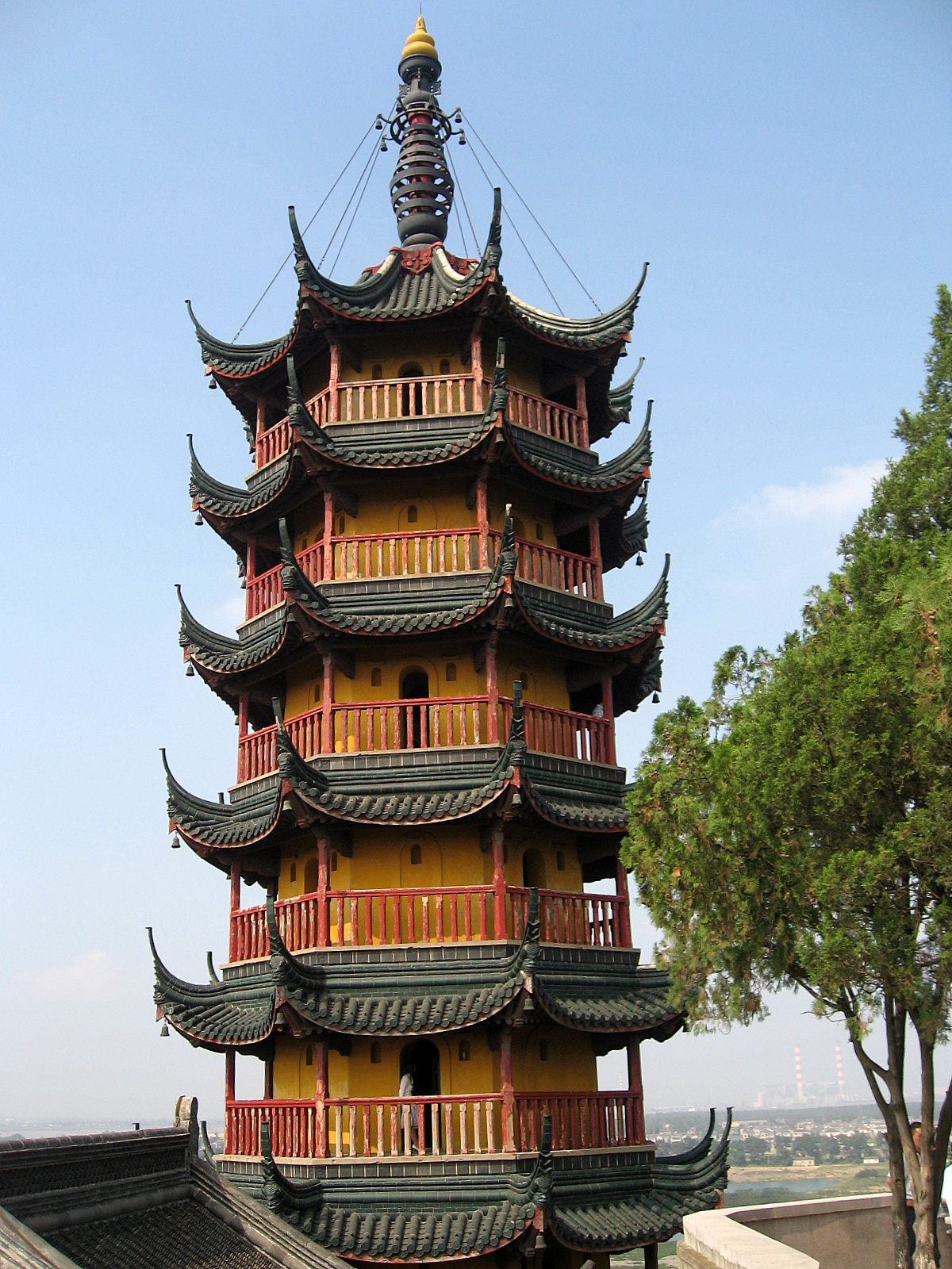 金山寺 - 慈寿塔